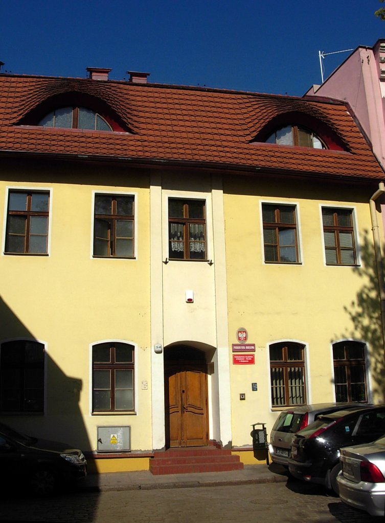 Kamienica Przyrzecze 2-4 w Bydgoszczy